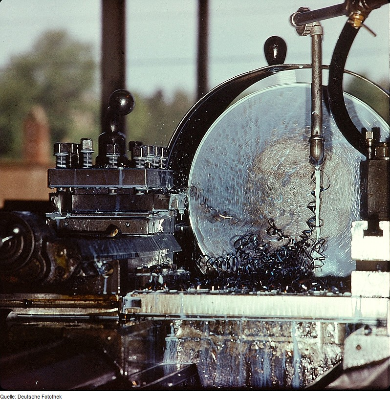 Original image description from the Deutsche FotothekZerspannungsfacharbeiter